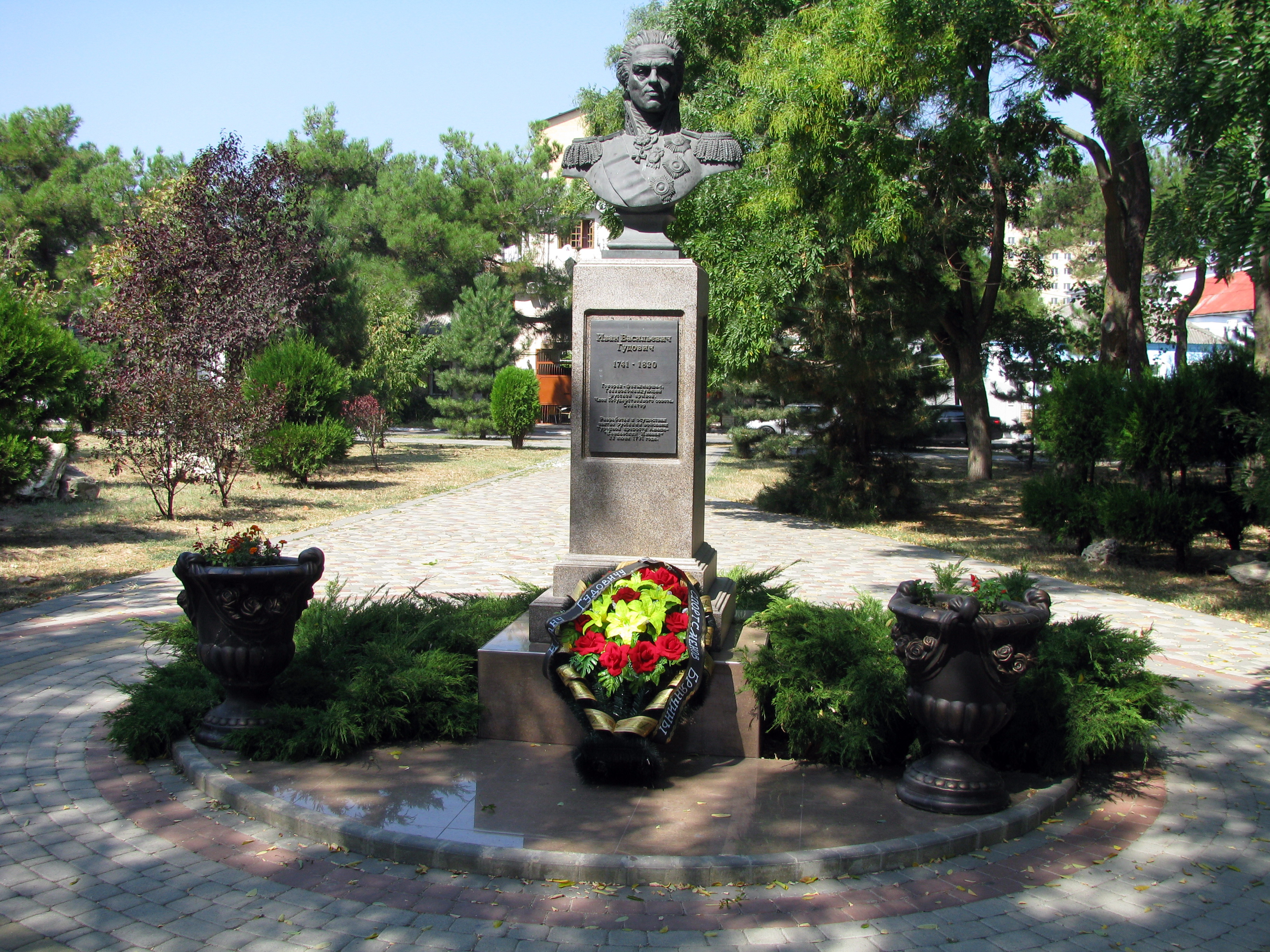 Мемориал, сквер, улица Протапова, 1, Анапа. Надпись на табличке: Иван Васильевич Гудович 1741-1820 Генерал-фельдмаршал, Главнокомандующий русской армией, Член Государственного совета, Сенатор. Разработал и осуществил взятие русскими войсками Турецкой крепости Анапа-"Кавказский Измаил" 22 июня 1791 года